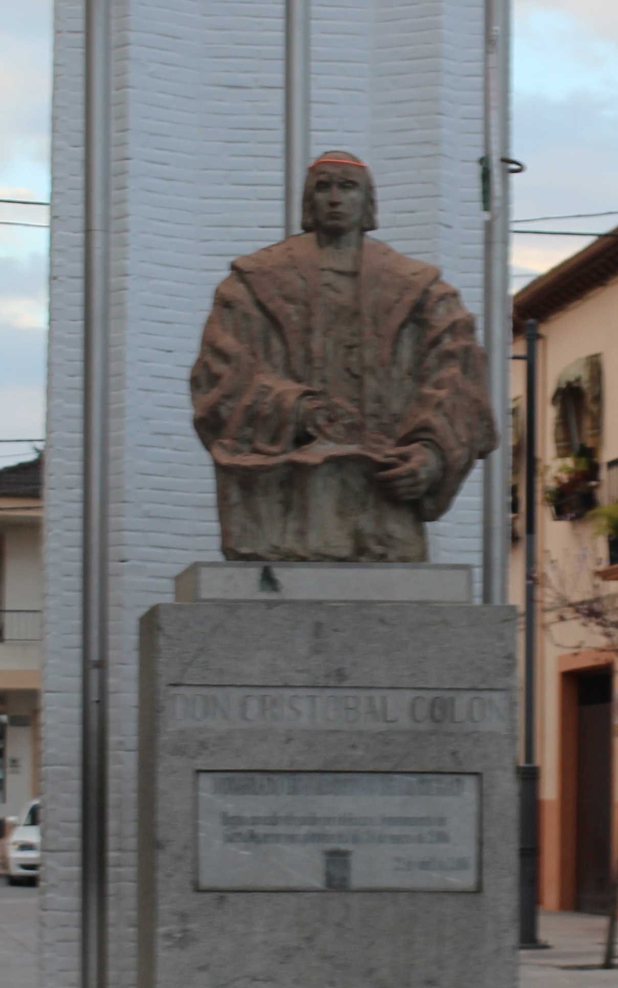 Estatua en honor a Cristobal Colón en Santa Fe (Granada).